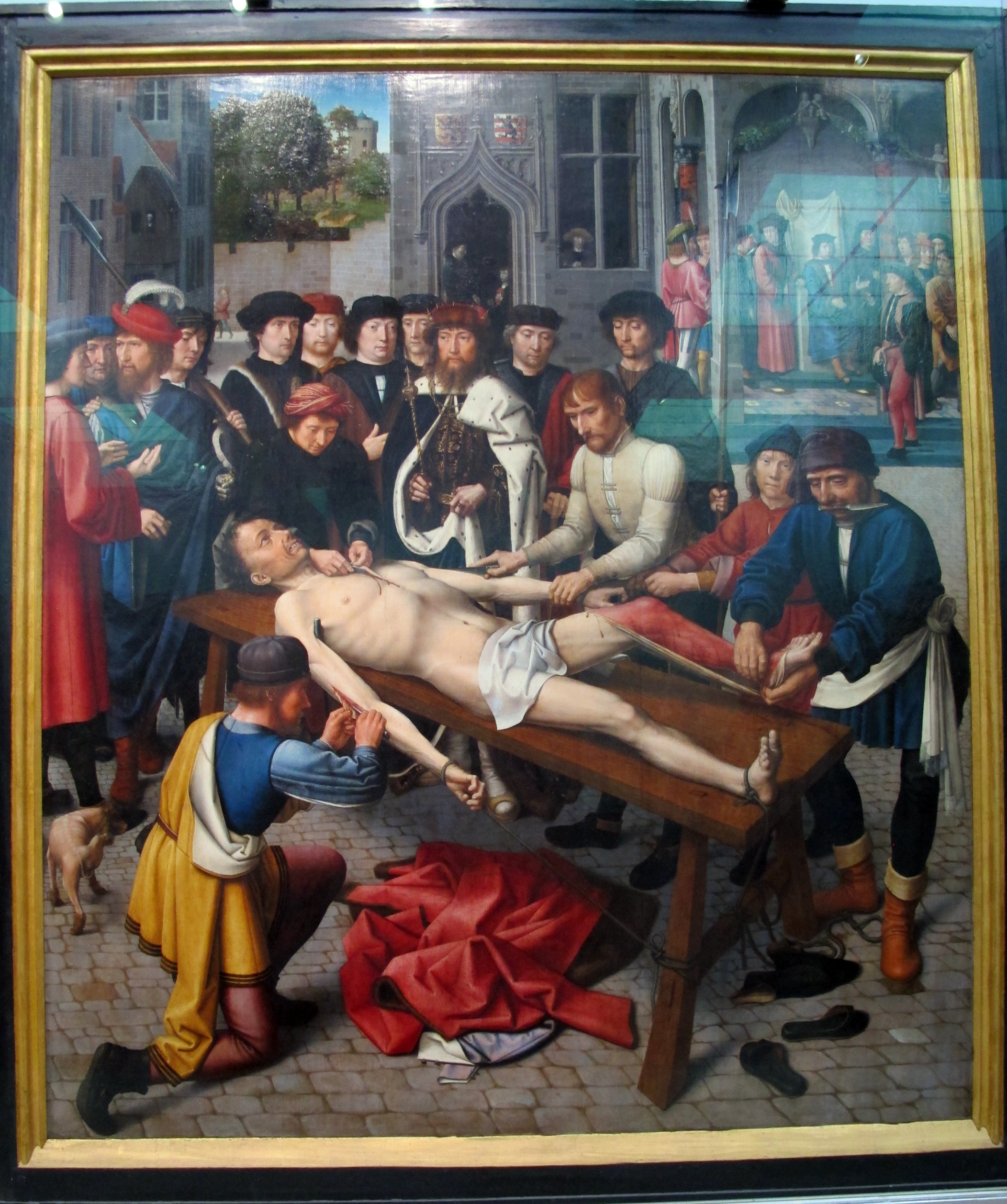 Gerard david, giudizio di cambise, 1498